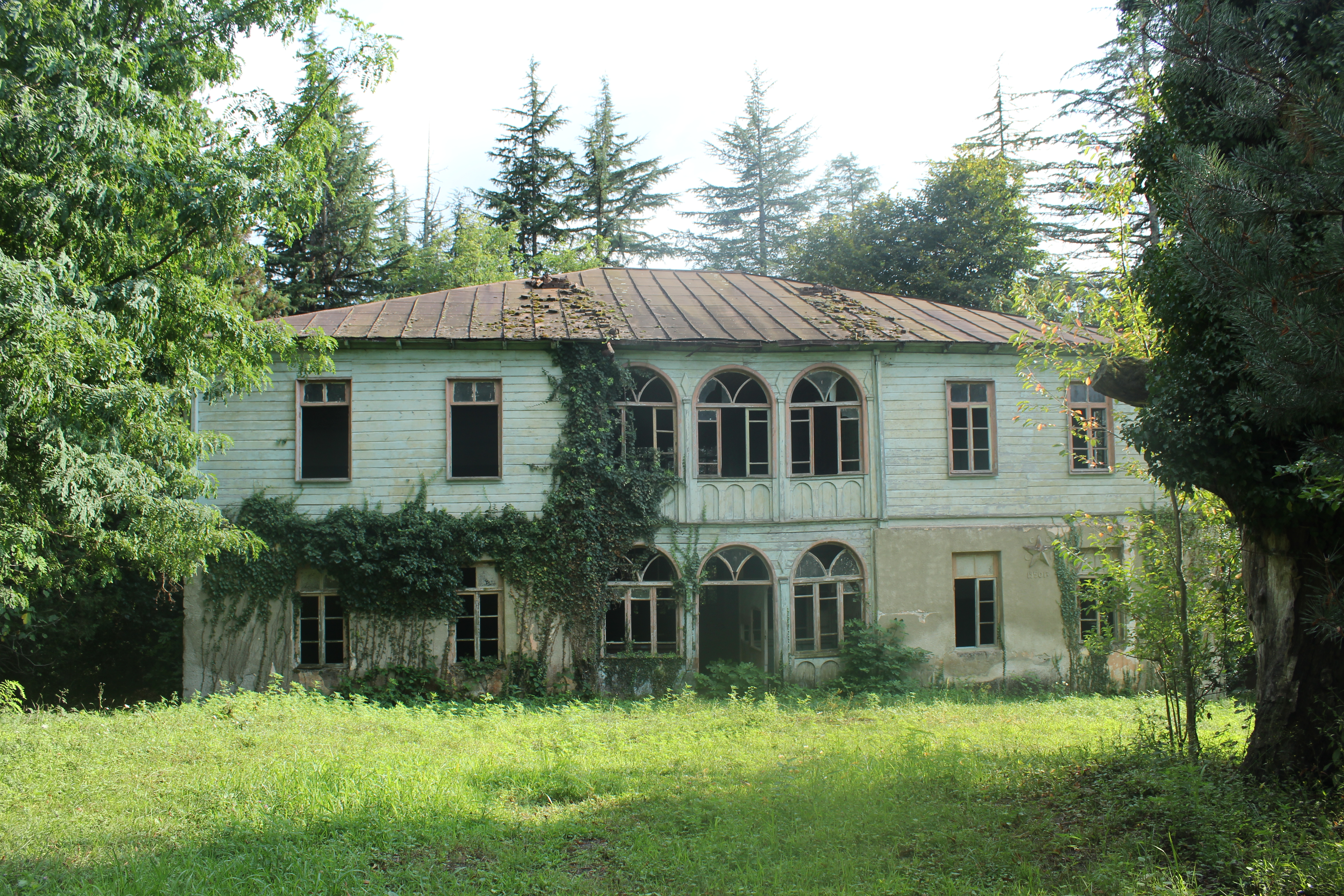 გორაბერეჟოულის ტყე-პარკი, უფუნქციო შენობა